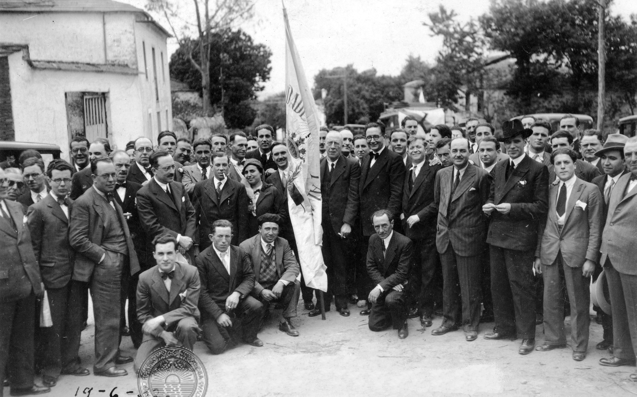 Homenaxe a Castelao en Lugo: Bandeira da Irmandade da Fala luguesa, Ramón Villar Ponte, Francisco Fernández del Riego, Antón Villar Ponte, Plácido Castro, Ramón Otero Pedrayo, Ramón Rodríguez Somoza, Manuel Beiras García, Manuel Lugrís, Castelao, Ramón Suárez Picallo, Carlos Maside, Alexandre Bóveda.